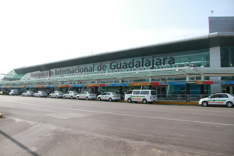 Aeropuerto de Guadalajara